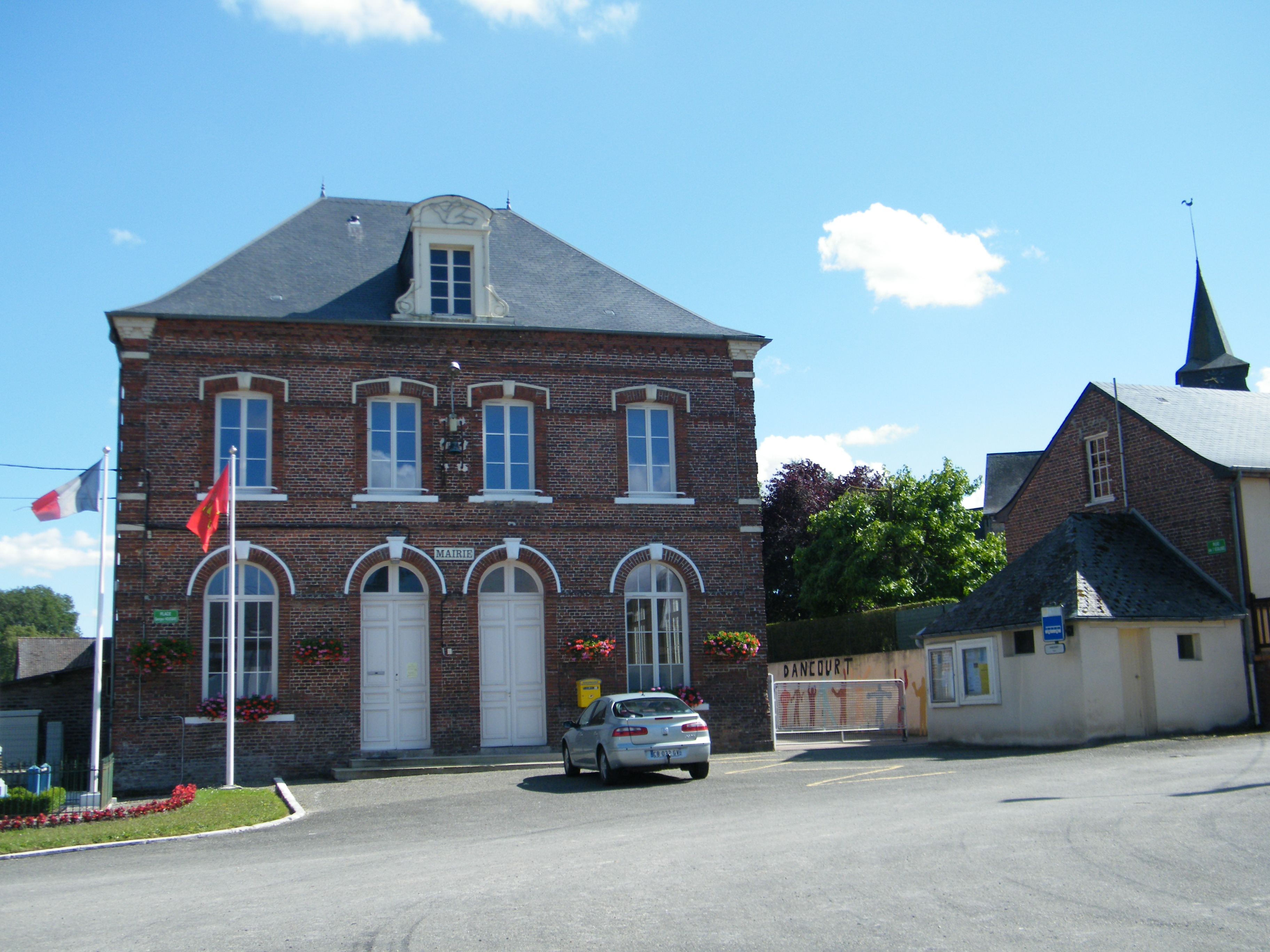 Dancourt, Seine-Maritime, France, mairie-école.